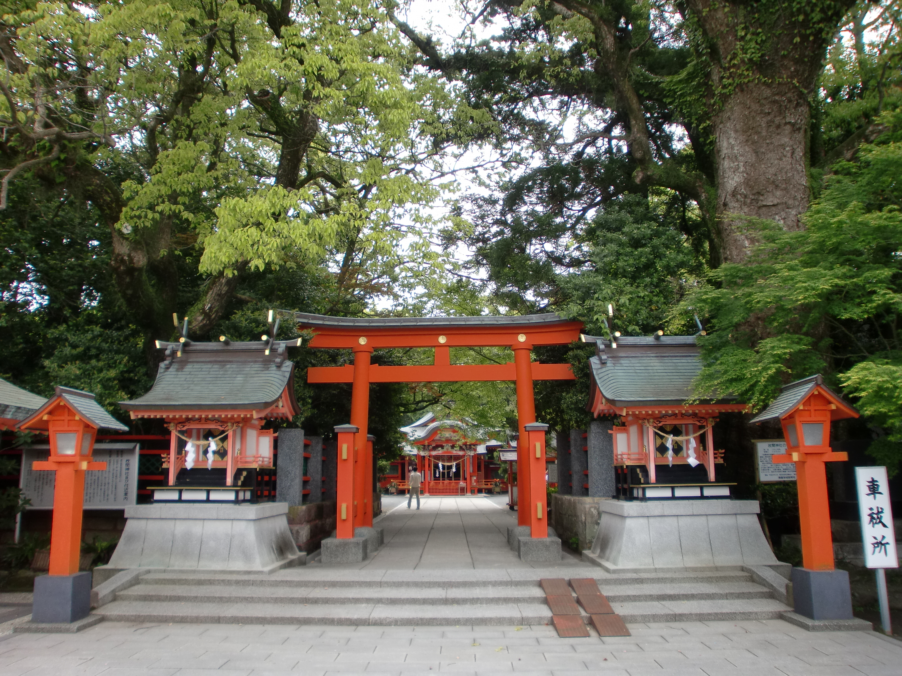 枚聞神社の二の鳥居から望んだ勅使殿